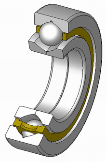 Boladun errodamendu zurruna